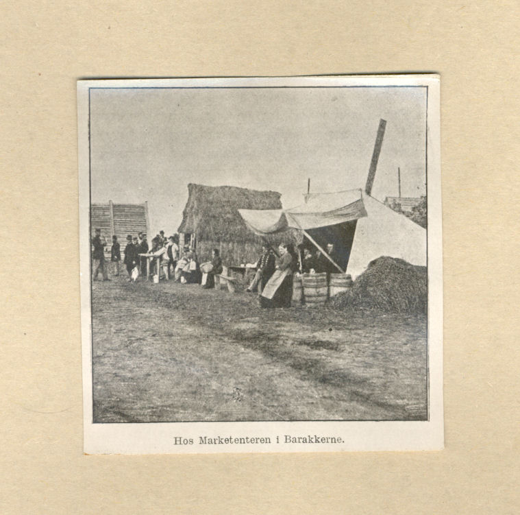 Hos marketenderen i barakkerne, 1864.